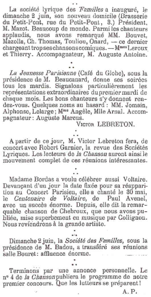 Annonces parues dans la revue "La Chanson", juillet 1878, 1ère année, numéro 3, page 37.